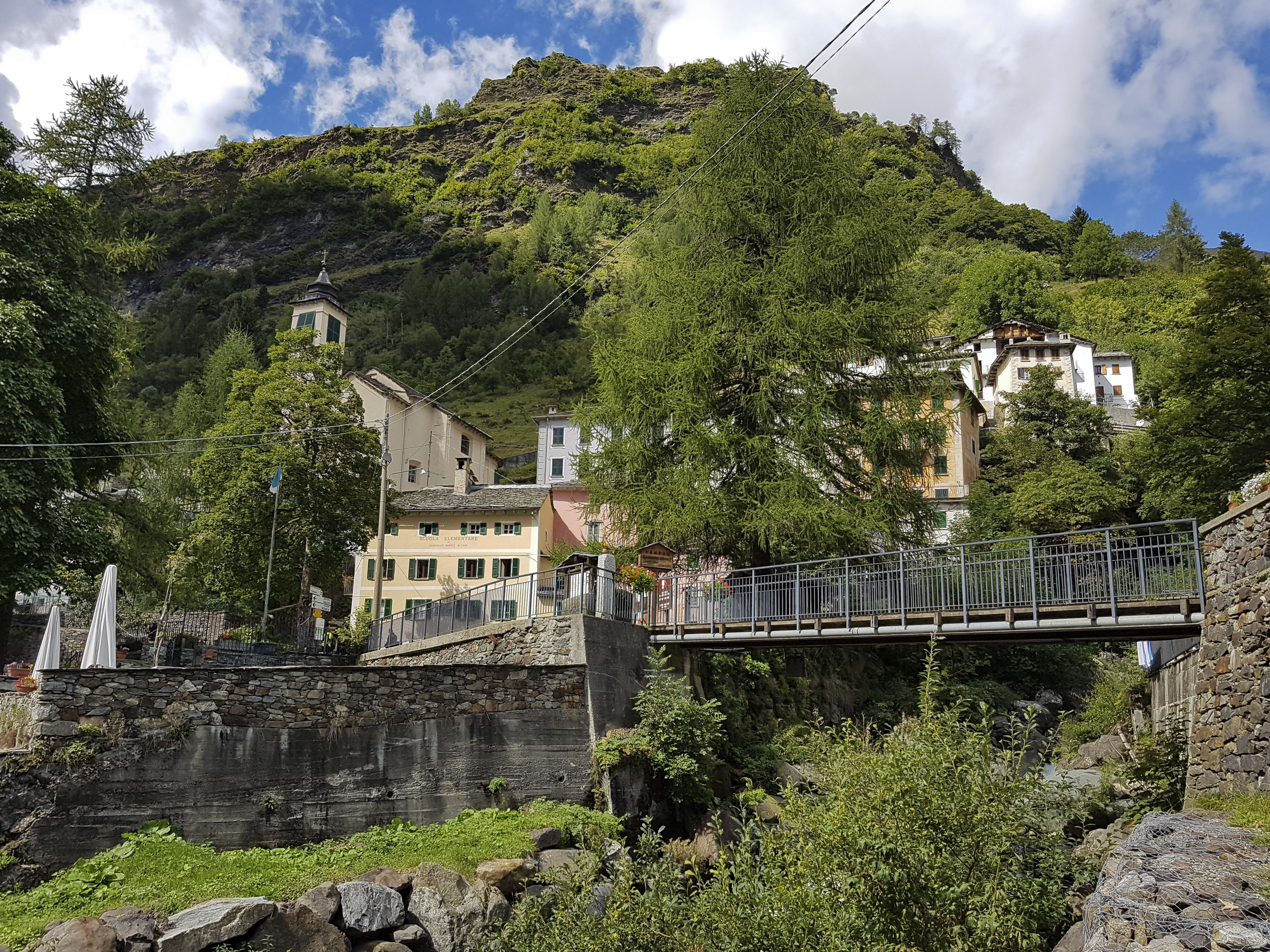 Ex scuola elementare vista dall'area picnic di Campello Monti